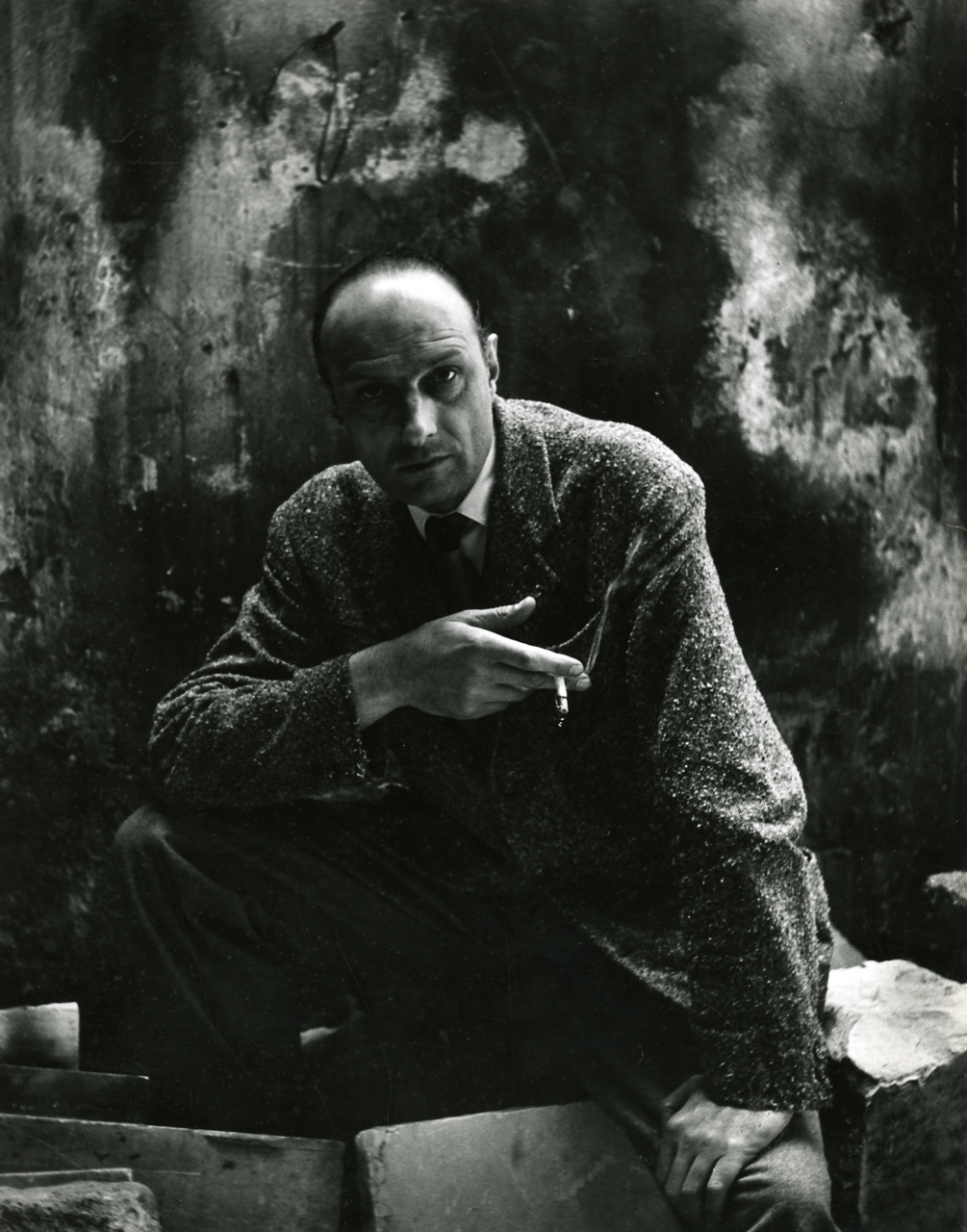 Servizio fotografico : Milano, 1958 / Paolo Monti. - Stampe: 2 : Positivo b/n, gelatina bromuro d'argento/ carta, 30x40. - ((Al verso delle stampe iscrizioni didascaliche e documentarie (date) manoscritte a matita: "Lo scultore Milani lungo/ la sua scultura alla Triennale", "Lo scultore Milani/ 1958"; timbri a inchiostro con data (1963) e copyright (Via Tasso [cancellata] e Corso Sempione - Milano). - Sul coperchio della scatola iscrizione didascalica manoscritta a pennarello nero: "Ritratti - figure ambientate". - La X Triennale (Prefabbricazione - Industrial Design: Esposizione Internazionale delle Arti Decorative e Industriali Moderne e dell'Architettura Moderna) si tenne dal 28 agosto al 15 novembre del 1954. - Fonte: Quaderno ad anelli di Paolo Monti: s.t. [Soggetti e committenti] (1956-1961), presso Archivio Paolo Monti